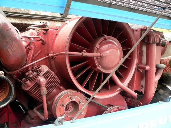 Двигатель F 10L 413. Вид спереди